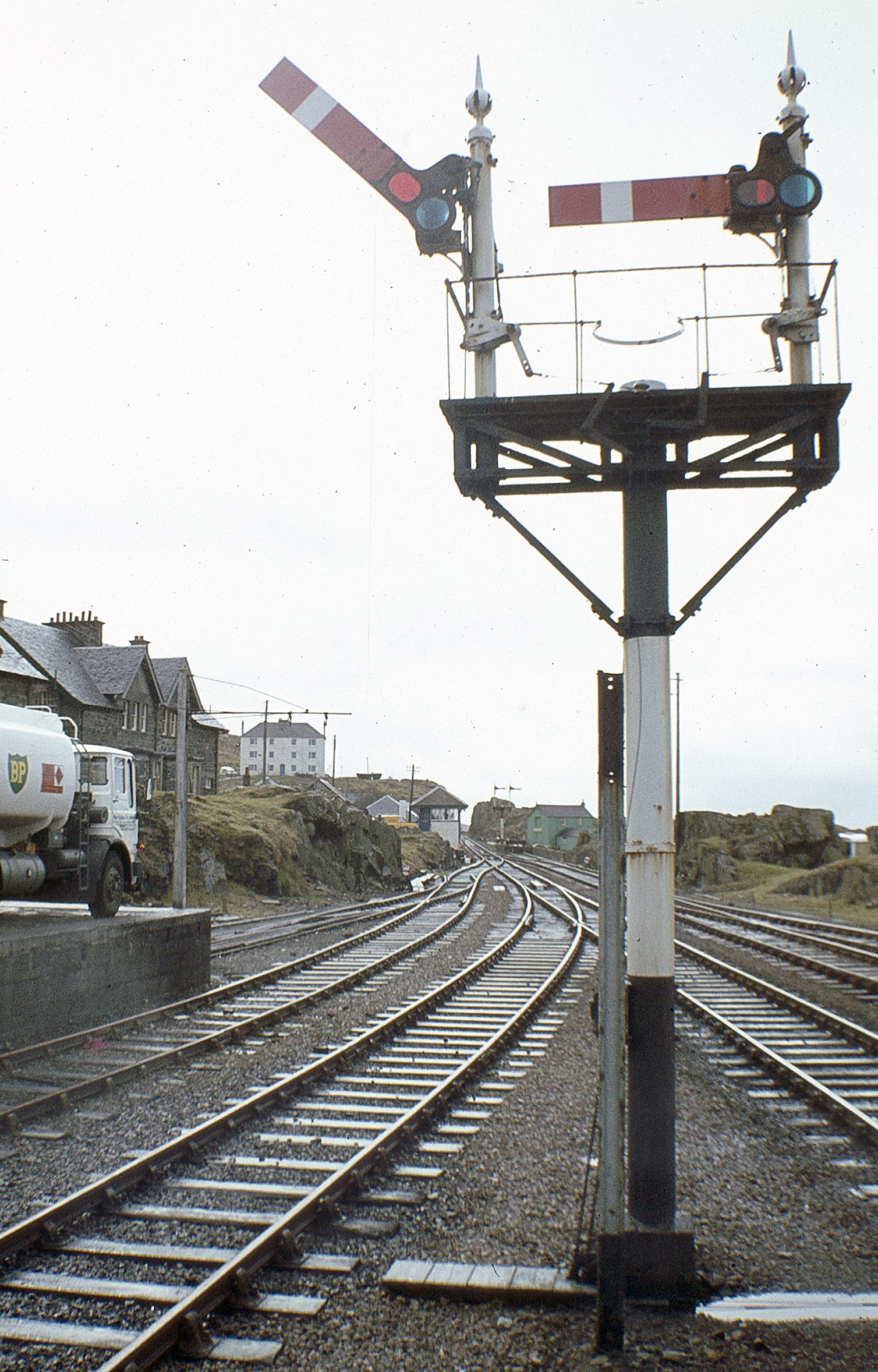 March 1982